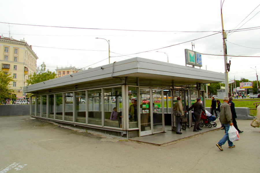 Yekaterinburg Metro (Екатеринбургский метрополитен)